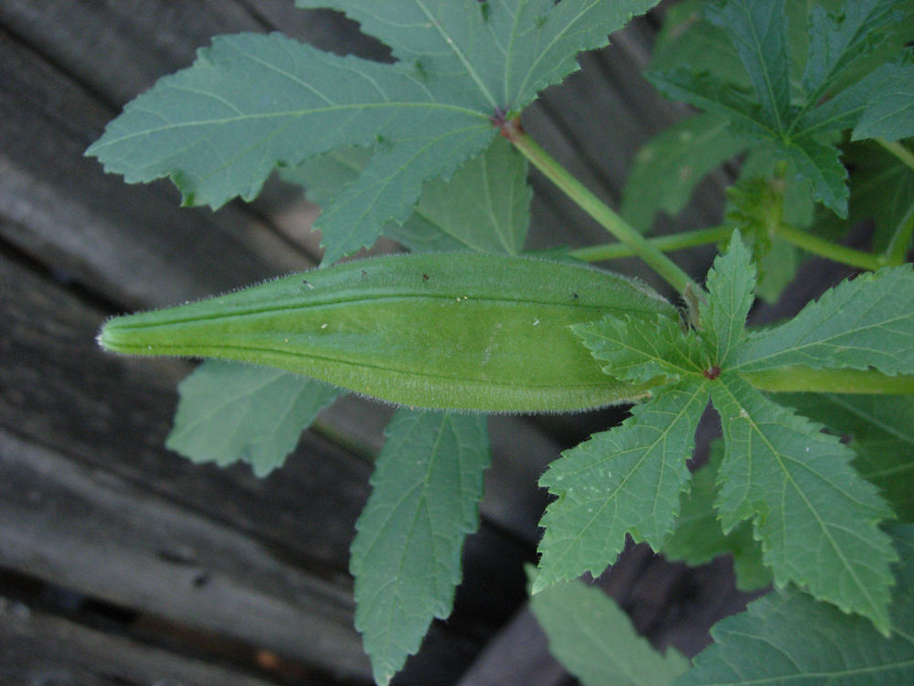 Okra growing in a Sub-urban garden